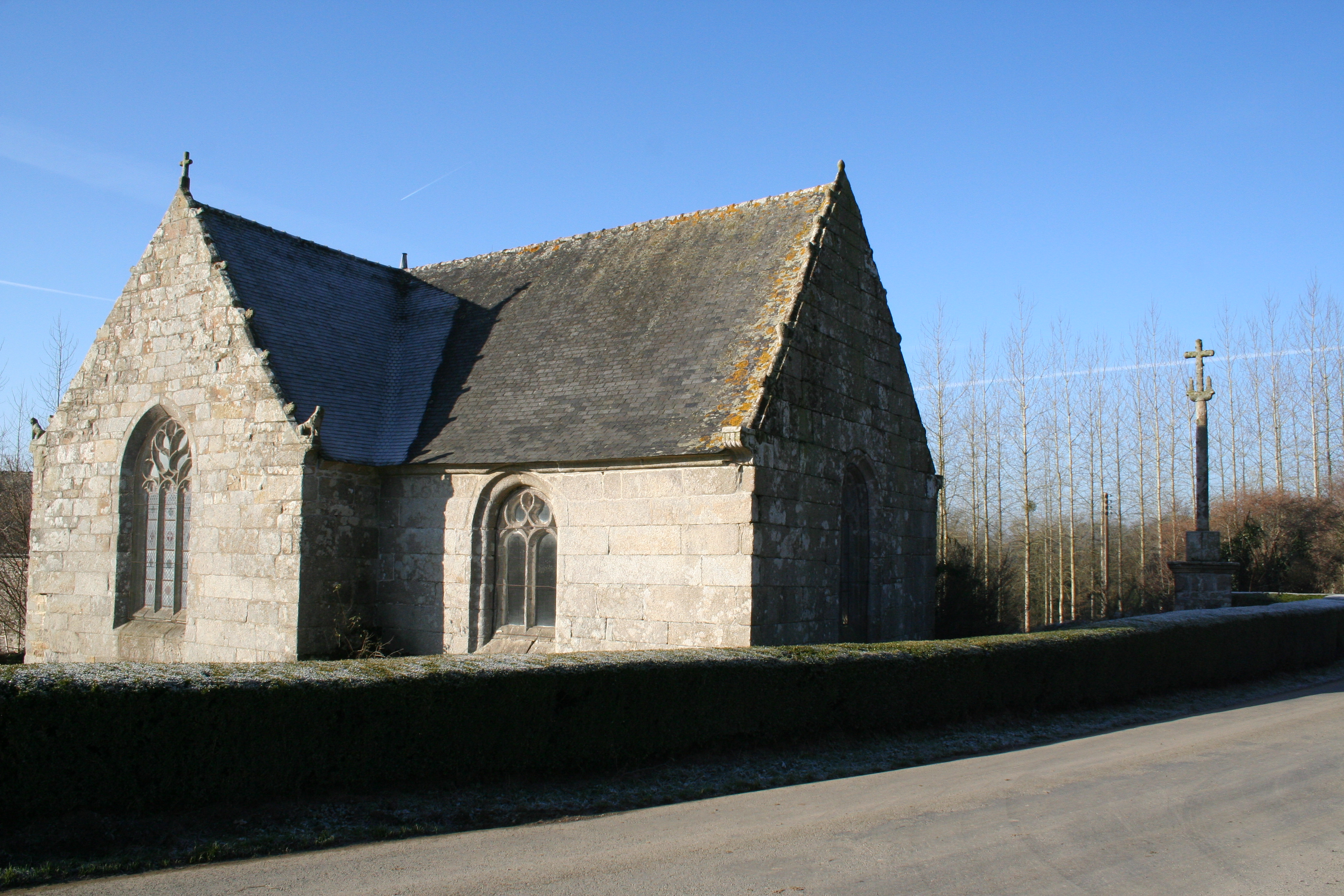 Prieuré de Landugen - Duault - Côtes d'Armor - France .